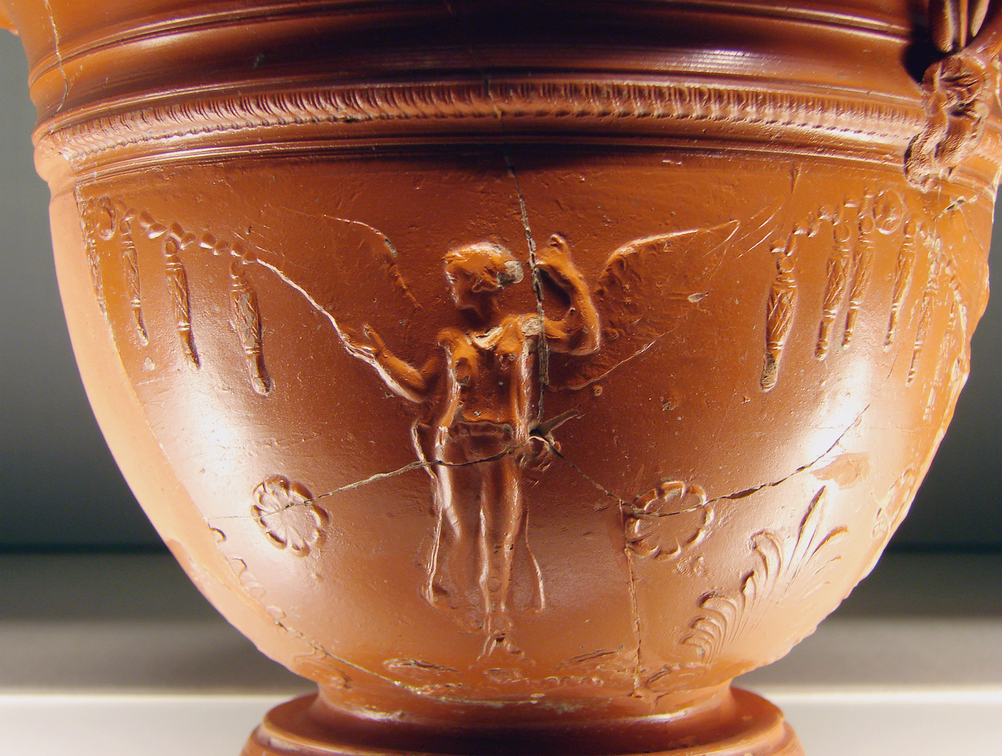 Céramique sigillée, époque gallo-romaine, musées de la Cour d'Or à Metz.